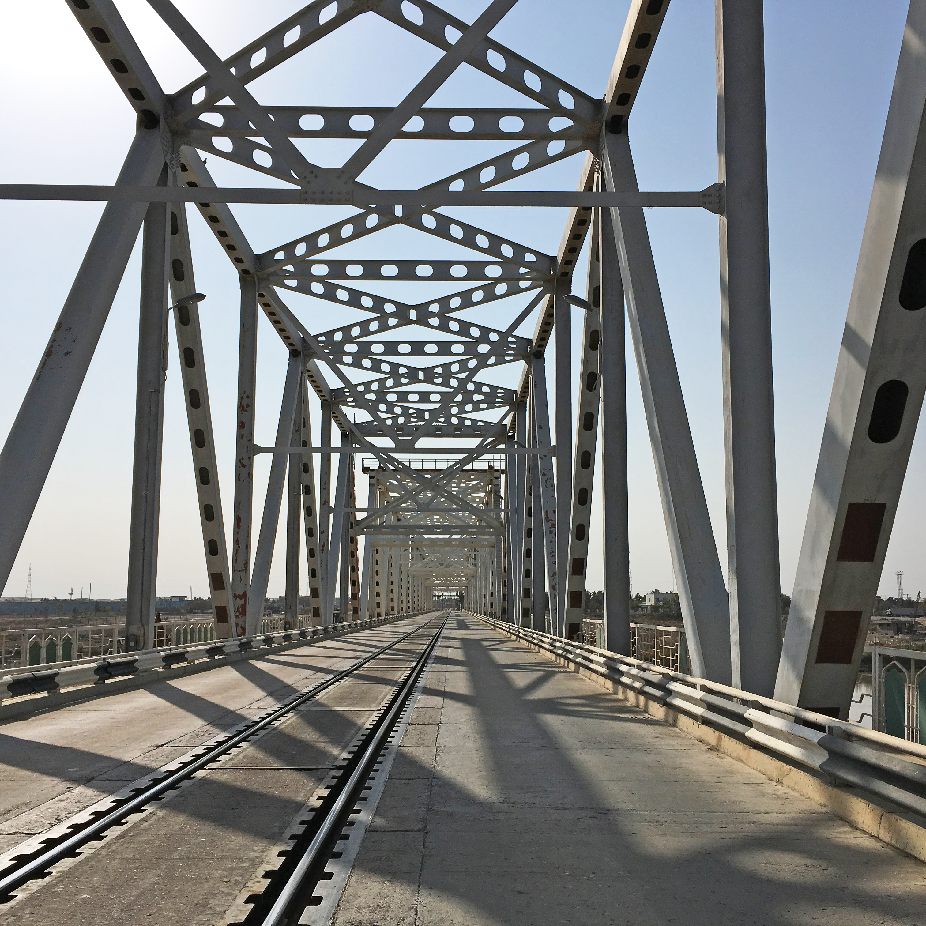 Afghanistan/Usbekistan: Brücke der Freundschaft über den Amudarja